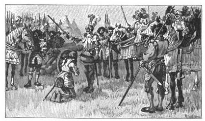 Illustration tirée de Histoire de France, cours élémentaire, Ernest Lavisse, Armand Colin, 1913, page 84 de l'édition Heath de 1919.